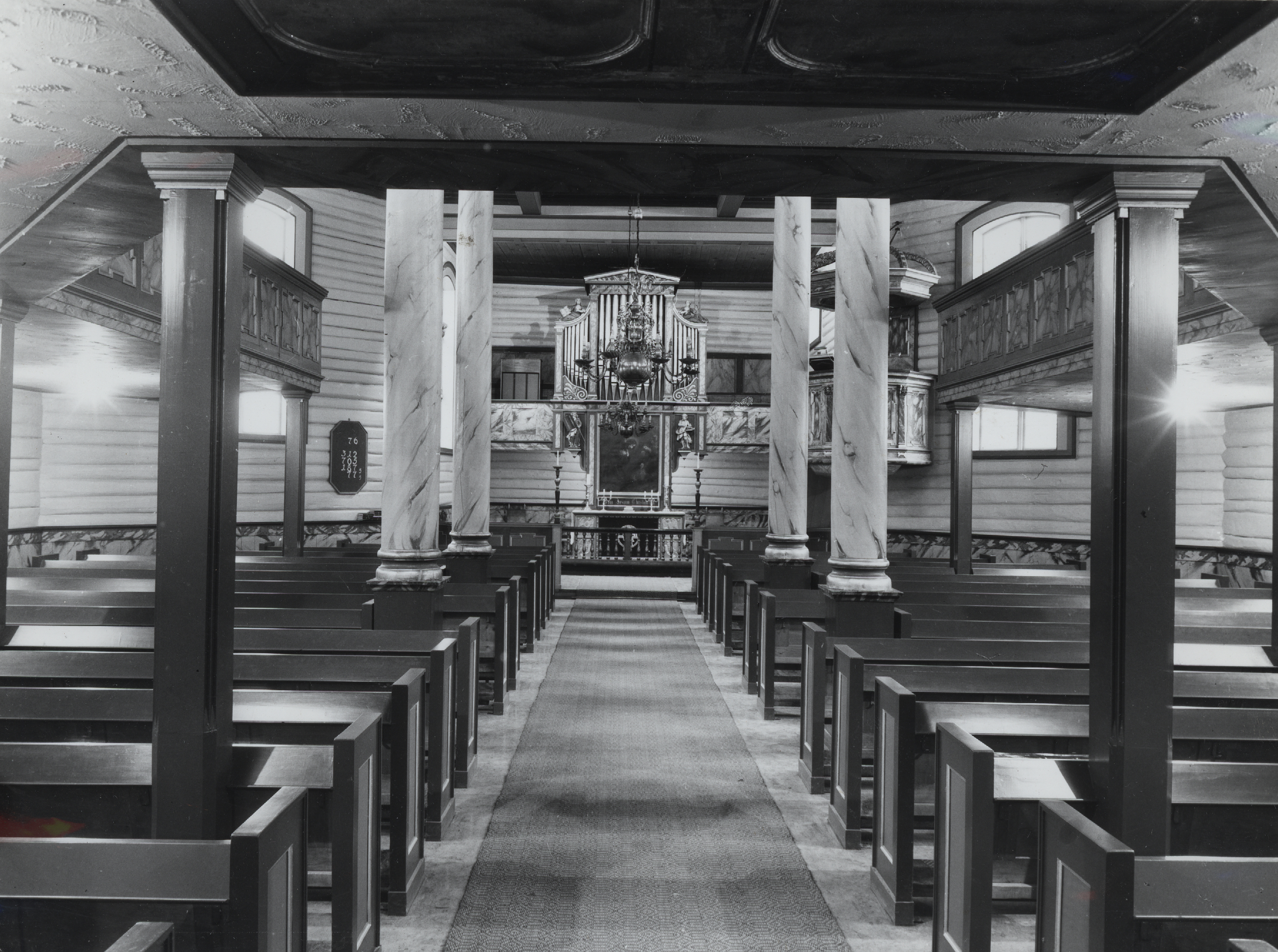 Format: Fotopositiv Dato / Date: 1965 Fotograf / Photographer: Ukjent Sted / Place: Innherredsveien, Trondheim Wikipedia: Bakke kirke (Trondheim) Eier / Owner Institution: Trondheim byarkiv, The Municipal Archives of Trondheim Arkivreferanse / Archive reference: Tor.H45.F9836 Merknad: Sognekirke for Bakklandet prestegjeld, oppført i 1714-15, innviet i 1715 og på ny i 1941. Kirken ble reist av eieren av Bakke gård, Biskop Peder Krogh. Kirka var den eneste bygningen som ble spart under svenskenes invasjon 1718. Kirken lå opprinnelig ute i Innherredsveien, og ble en betydelig trafikkhinder, da trafikken passerte på begge sider av kirka. I 1939 ble den flyttet til sin nåværende plassering, deretter restaurert og vigslet på nytt i 1941. (Kilde: Trondheim byleksikon, 2008)